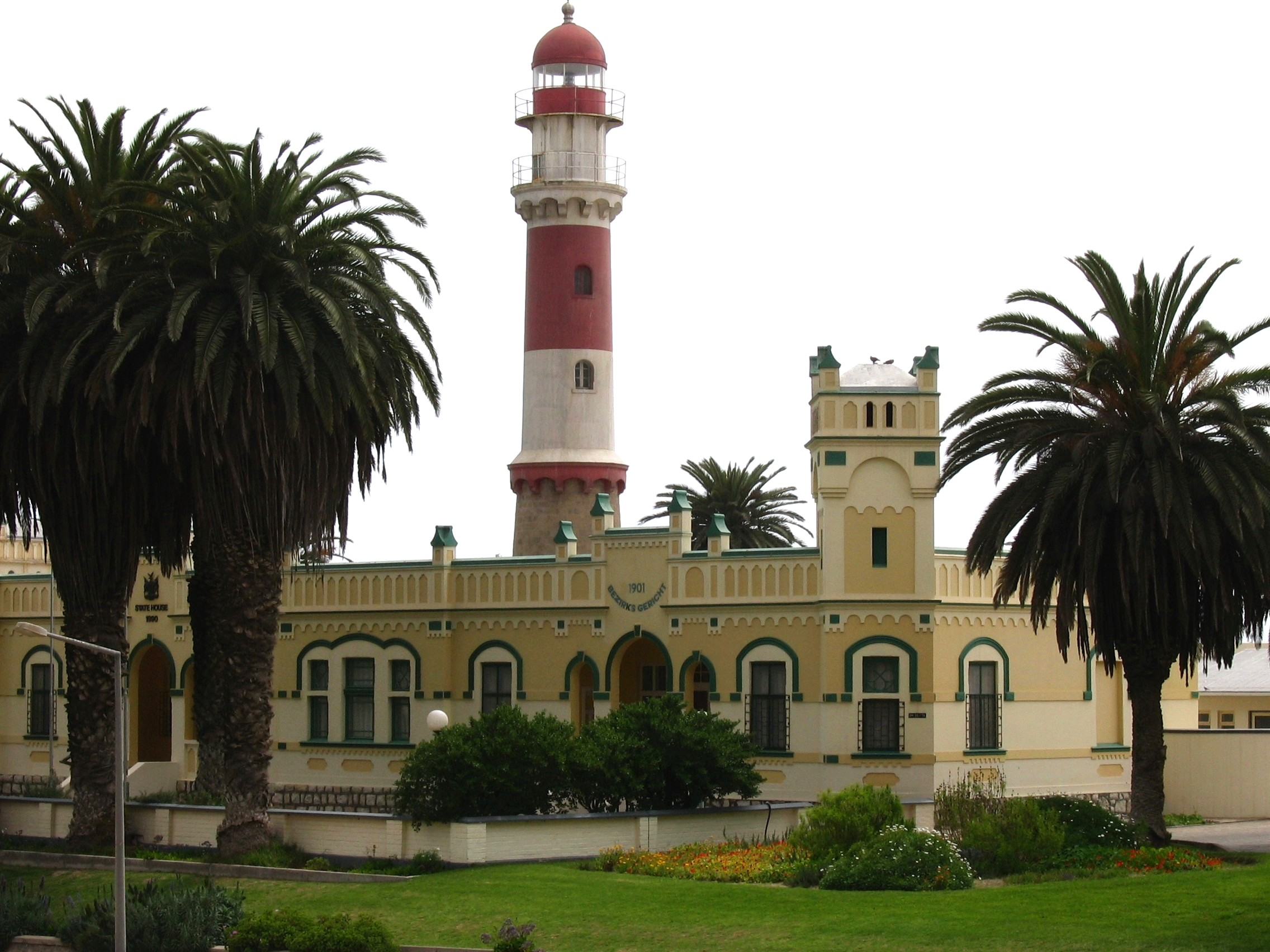 Leuchtturm mit Staatshaus (vormals:Kaiserliches Bezirksgericht) im Vordergrund, Swakopmund, Namibia. Leuchtturm aus dem Jahre 1902 (mit Erweiterung im Jahre 1911, Staatshaus aus dem Jahre 1911)